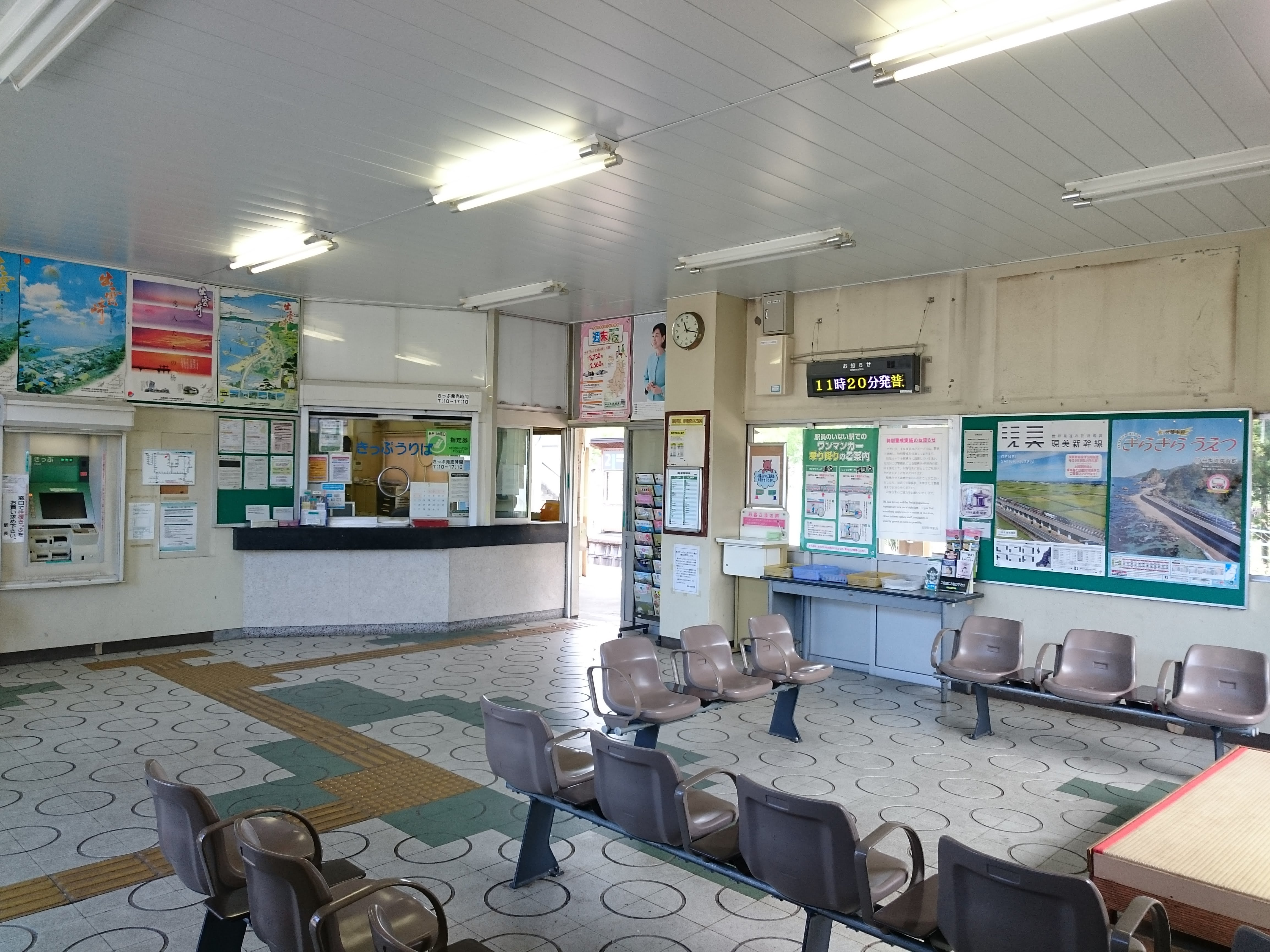 出雲崎駅のコンコース